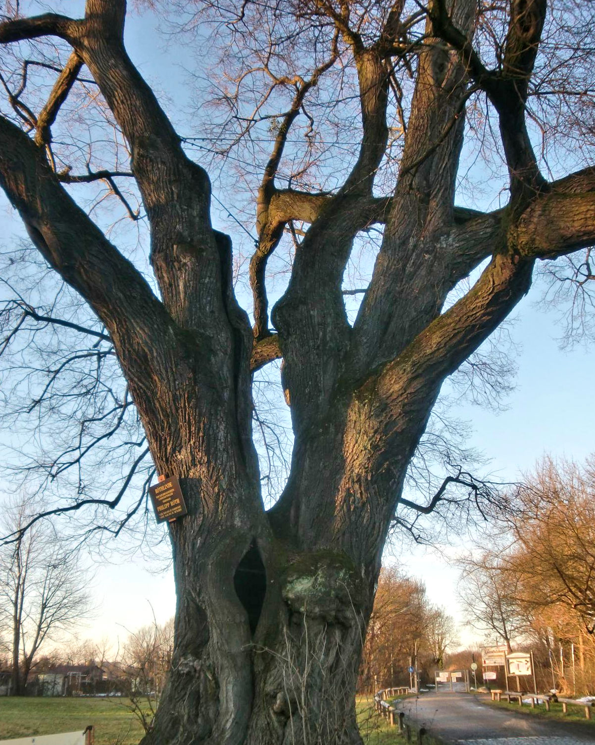 Die Röth-Linde im Winter (Februar 2011 in München), benannt nach dem Maler Professor Philipp Röth (1841-1921).